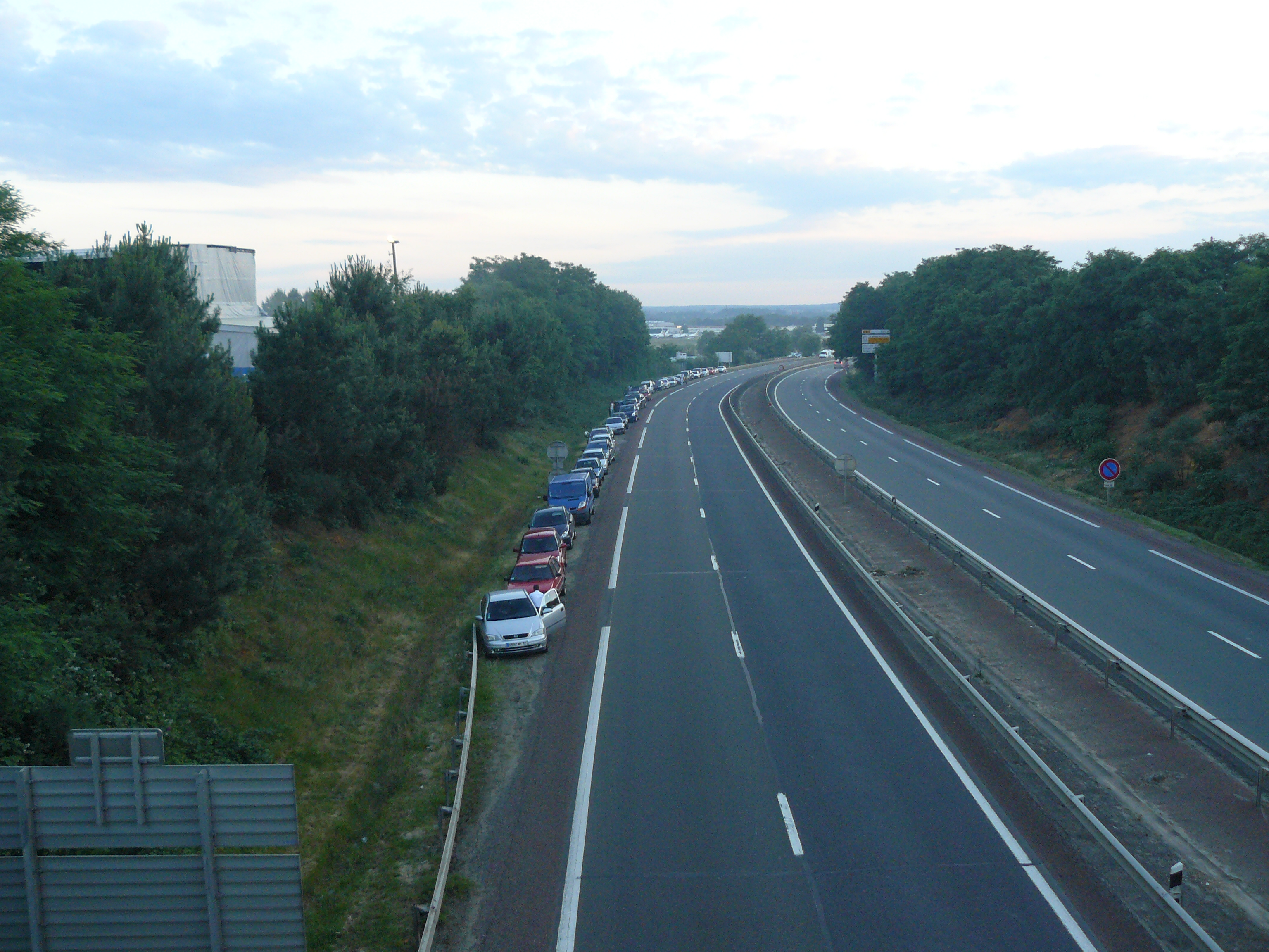 Le périphérique au nord du mans, saturé lors des 24 heures du Mans 2009: les véhiculent vont jusqu'à stationner sur le bas-côté de la voie rapide.